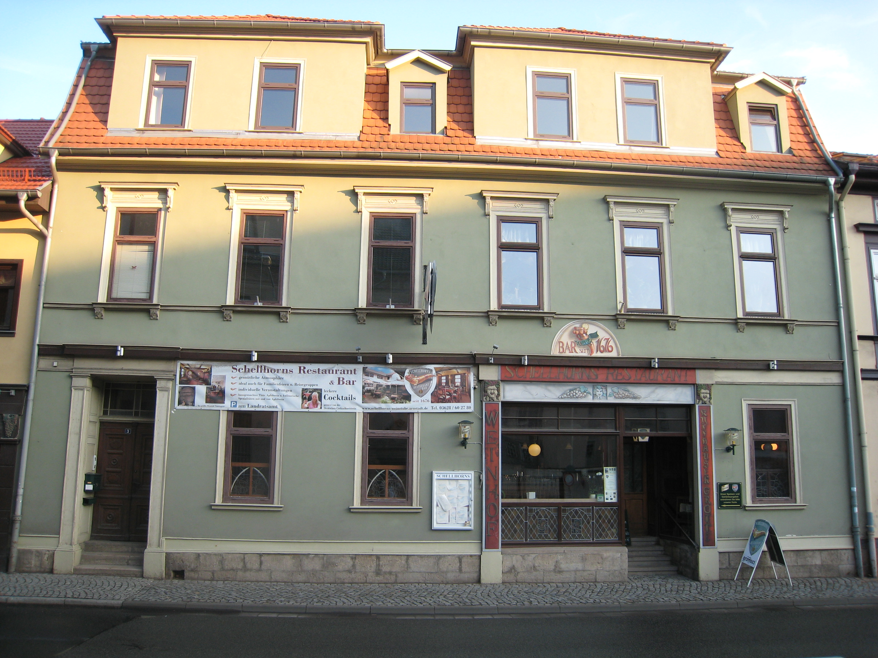 Gasthaus Schellhorn in der Ritterstraße 3 in Arnstadt